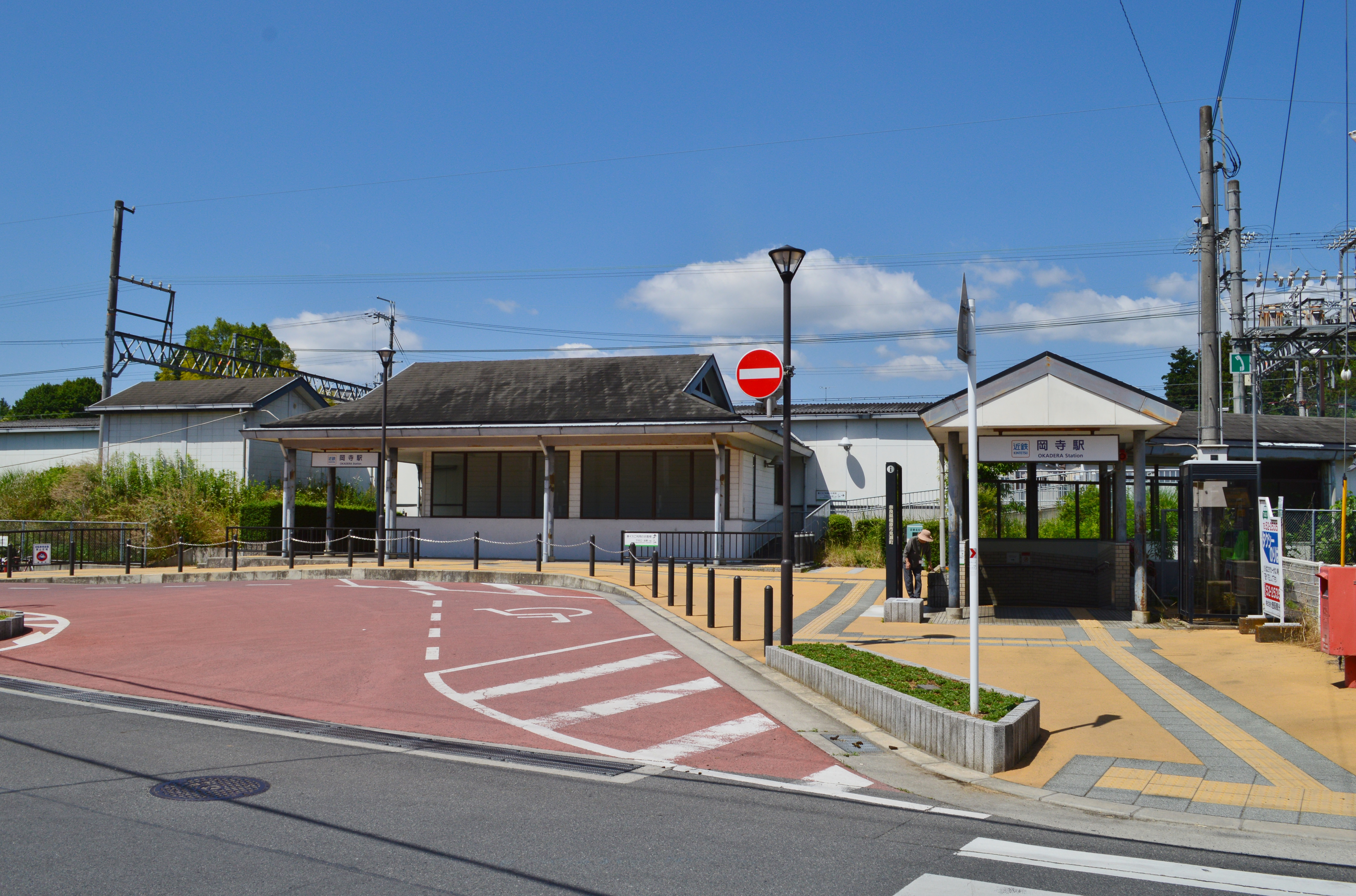 岡寺駅 東口